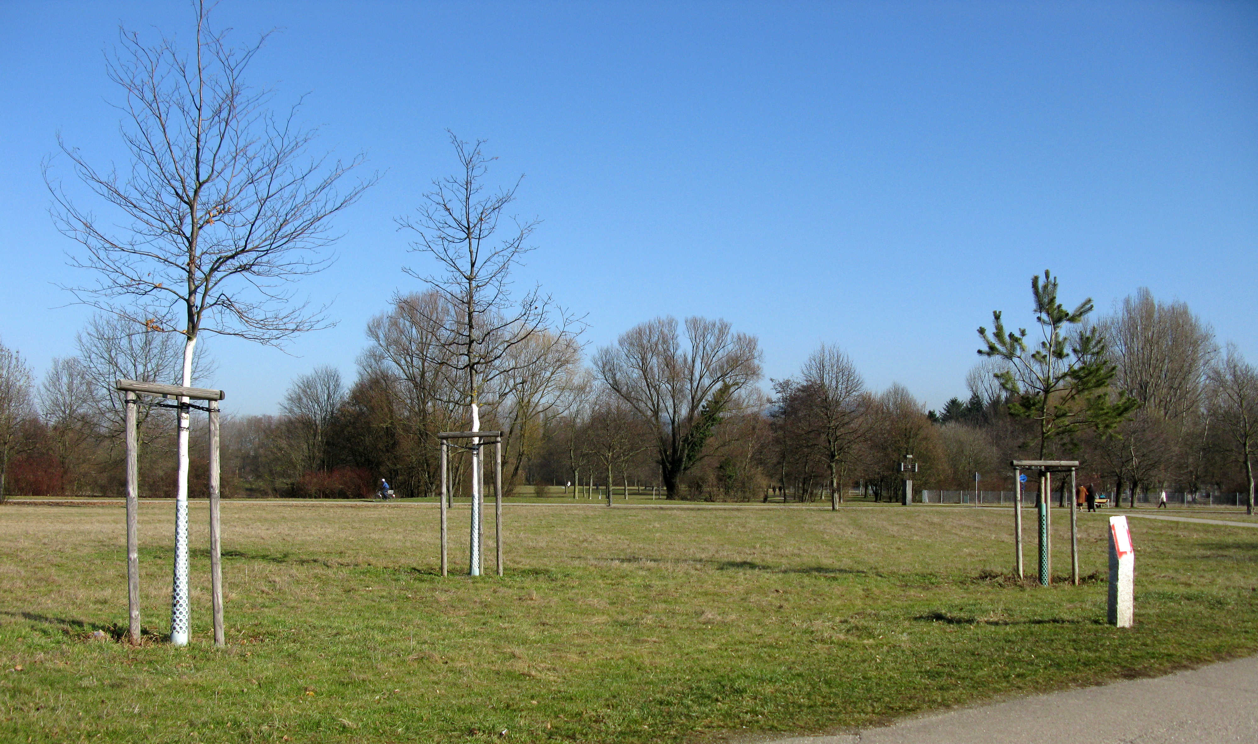 Drei Bäume für Deutschlands Einheit (Buche für den Westen, Kiefer für den Osten und Eiche für das wiedervereinigte Deutschland) im Dietenbachpark in Freiburg